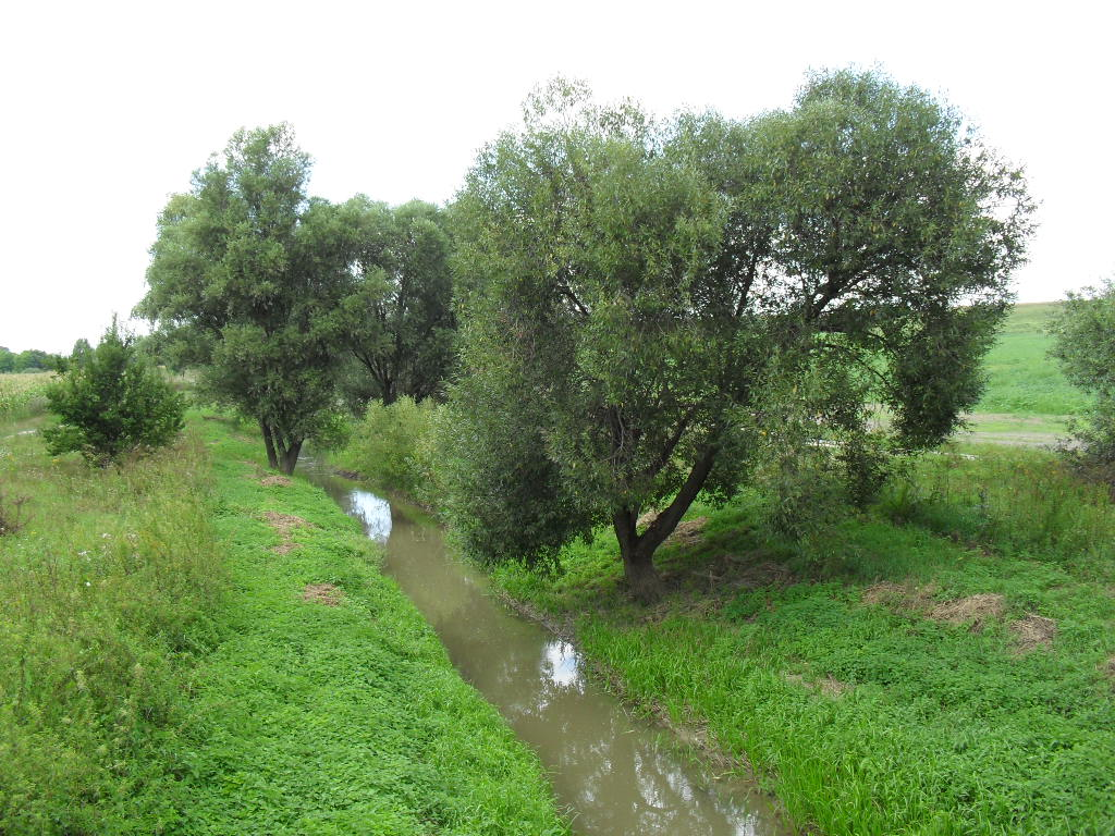 Bőny - a Cuhai Bakony-ér a község határában